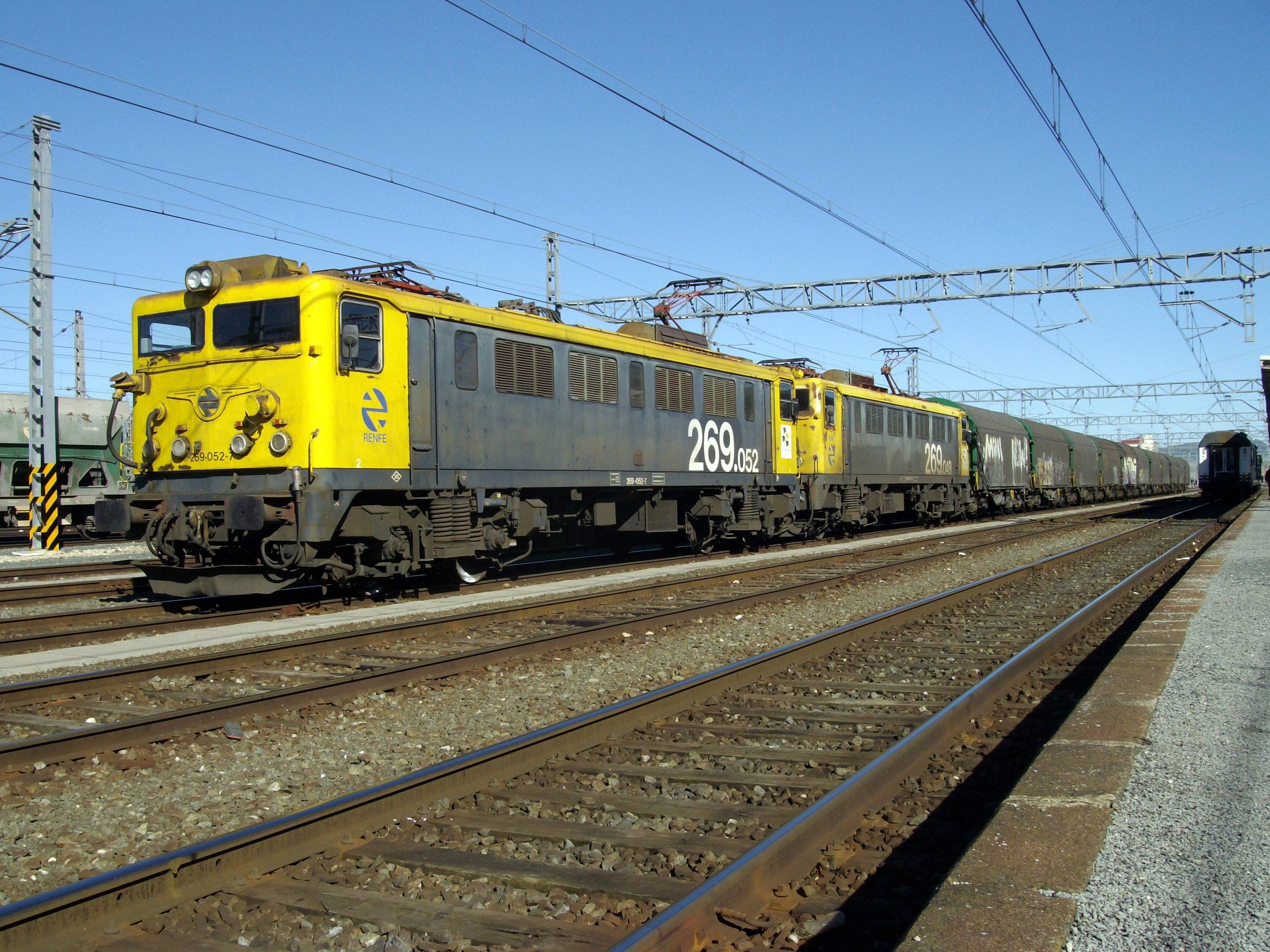 Para los pocos vagones Shimms que llevaba, las 2 269 lo arrastraban. Como se pude comprobar el estado de la 269-052 es maravilloso.